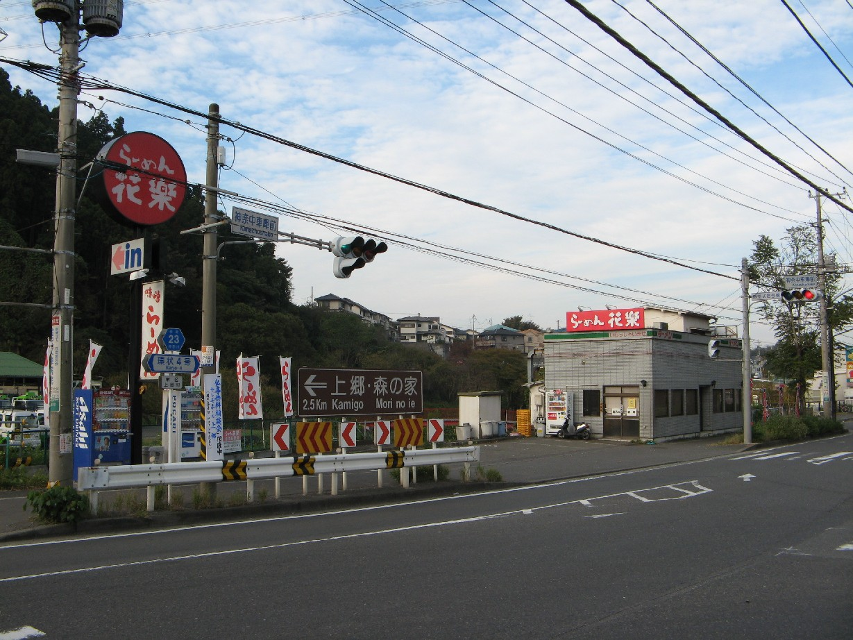 神奈中システムプラン「らーめん花楽」